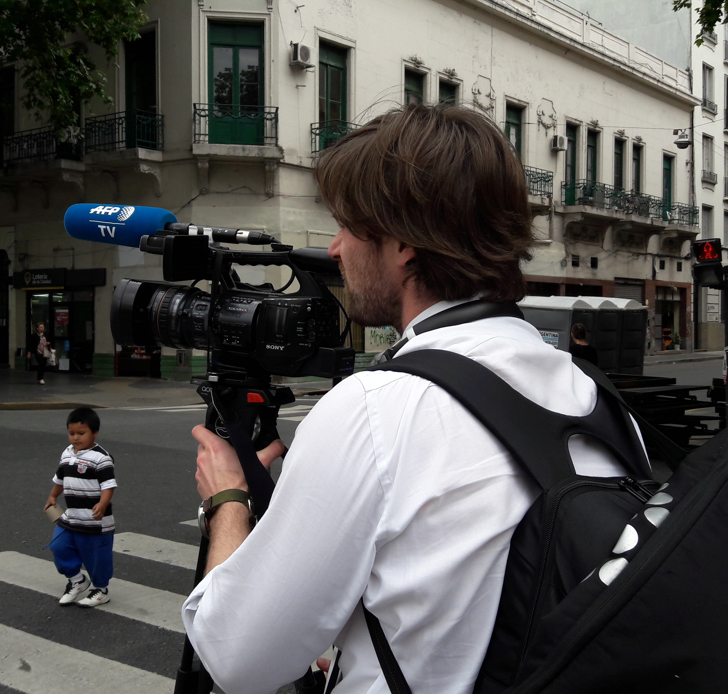 Manifestación contra el G20 y el FMI en Buenos Aires.